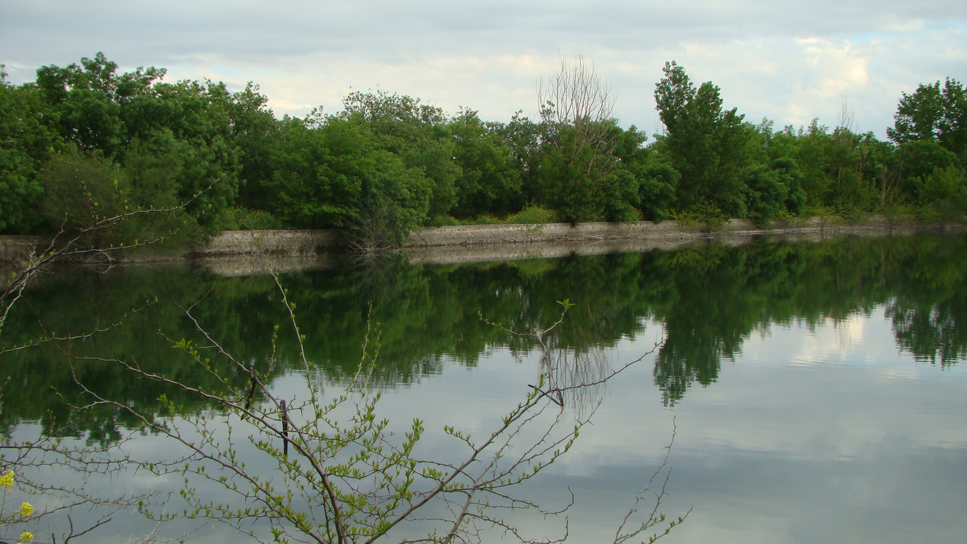 Vista de la Laguna grande de la Hacienda de la Laguna, Baeza